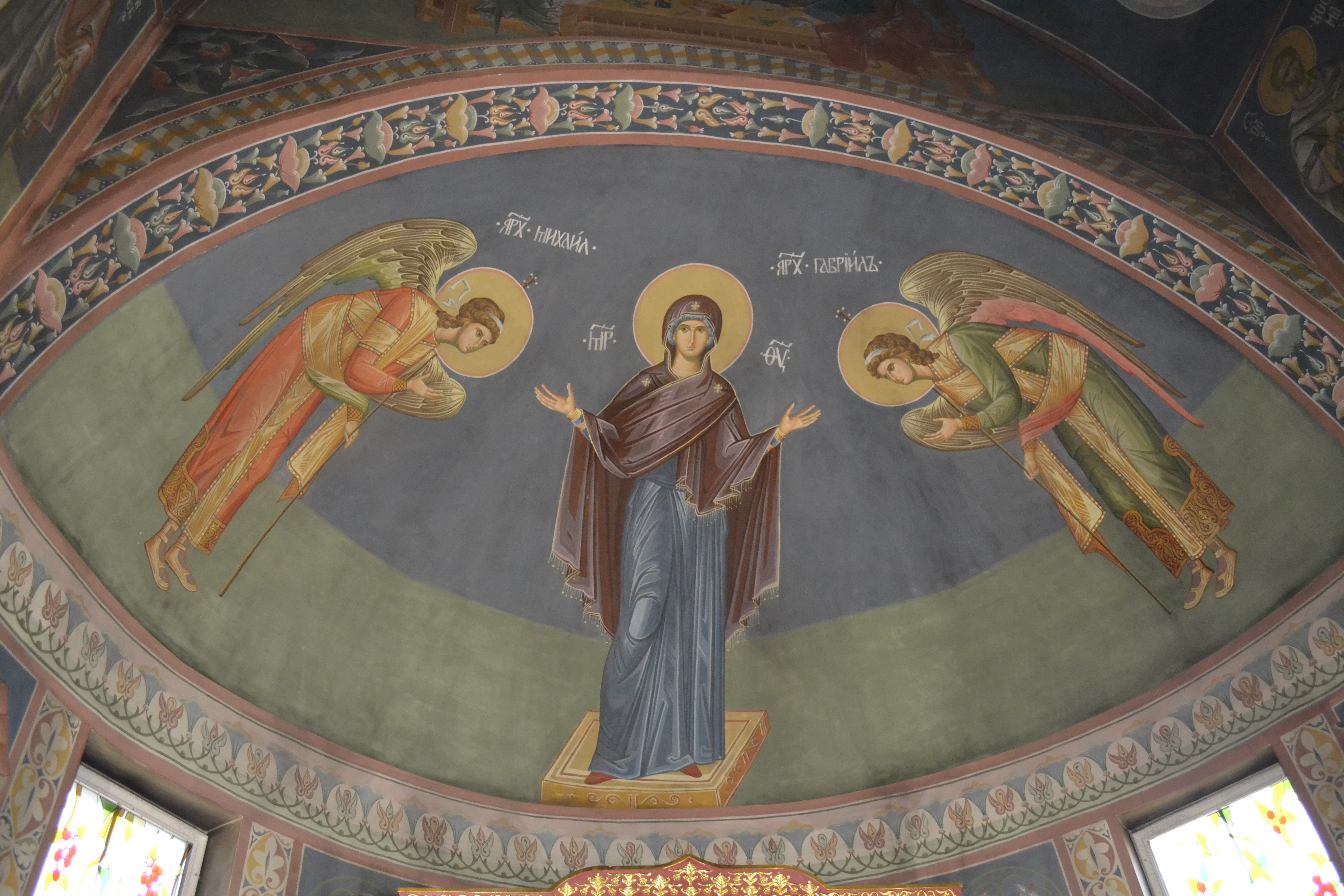 Алтарная апсида с росписью, на росписи Богородица и Архангелы